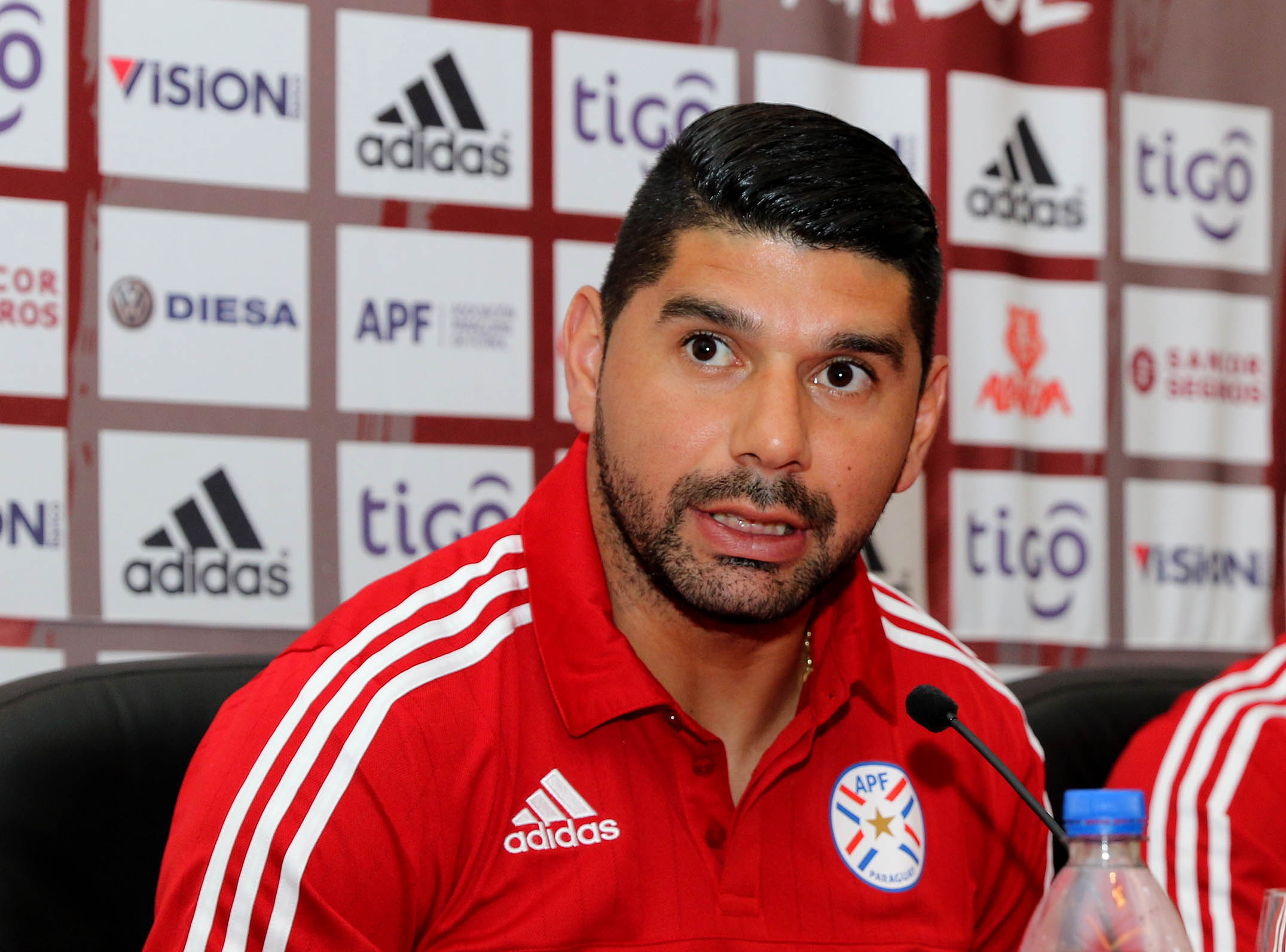 Guayaquil 23 de marzo del 2016 (Andes).-Néstor Ortigoza y Miguel Samudio, jugadores de la selección paraguaya de fútbol, durante la rueda de prensa que ofrecieron en Guayaquil. Foto:Andes/César Muñoz